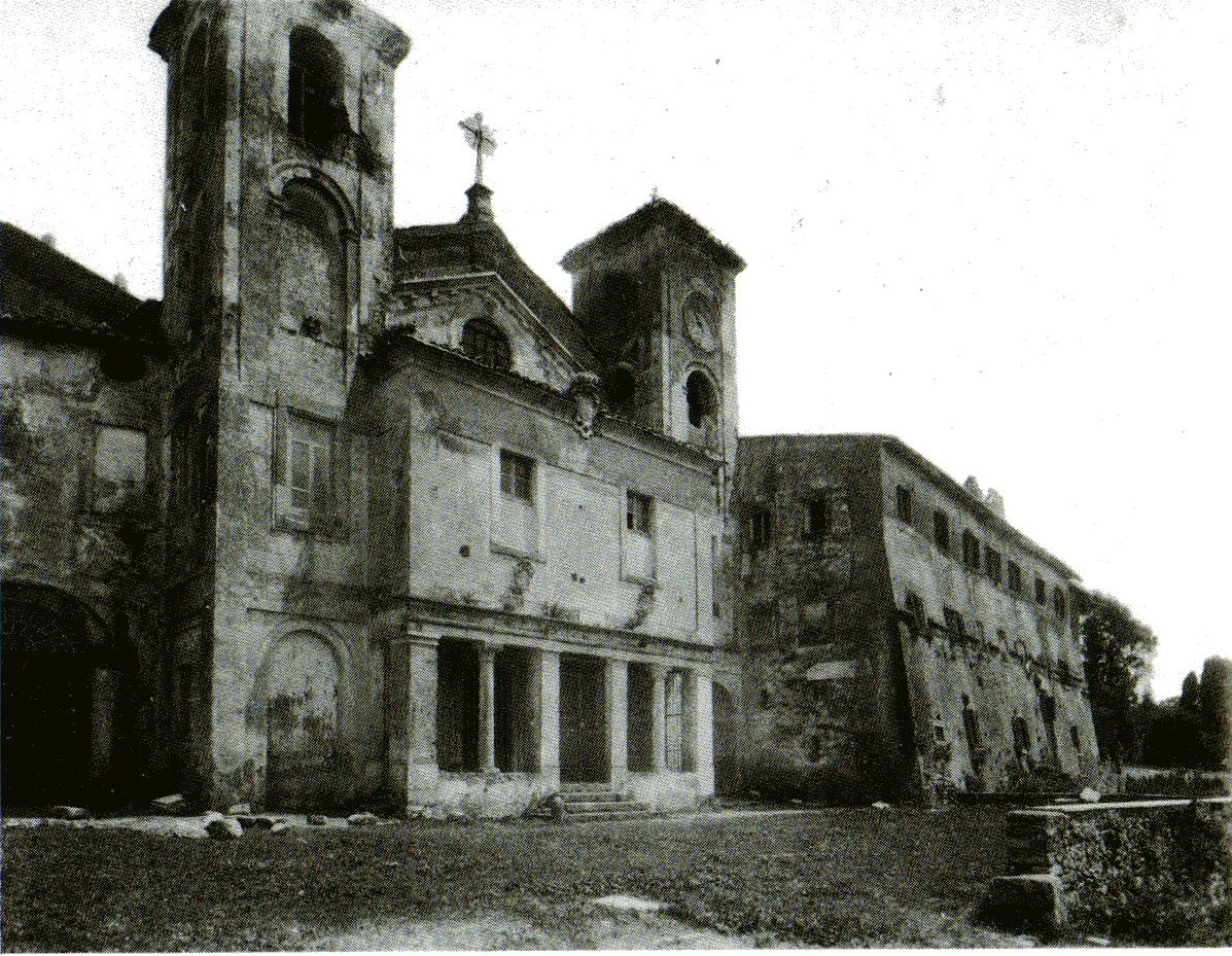 Palazzolo (Rocca di Papa, RM) prima dei restauri